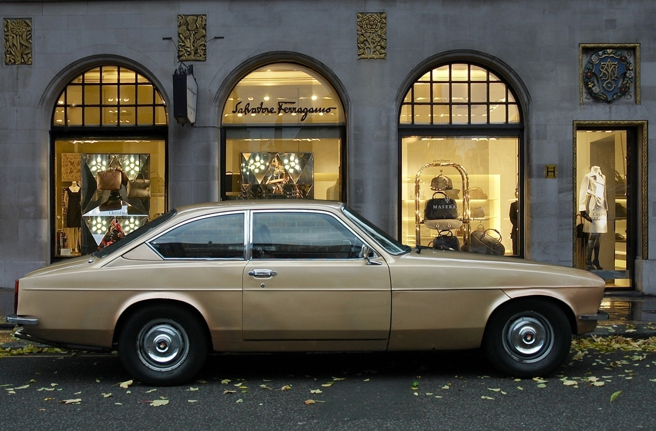 Bristol 603 S1 in Paris